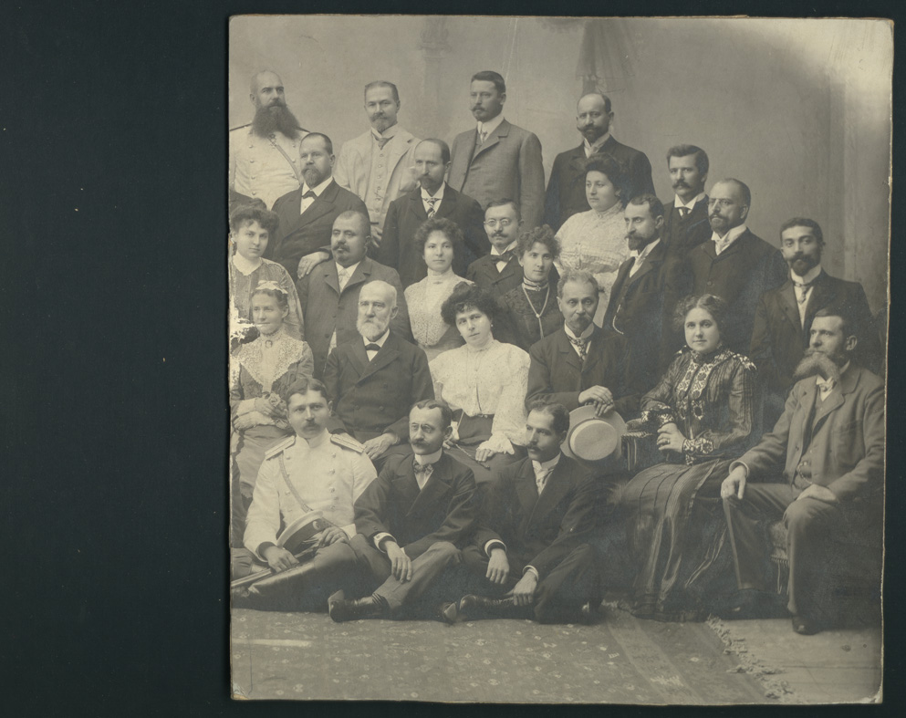 Преподаватели и възпитаници на Робърт колеж